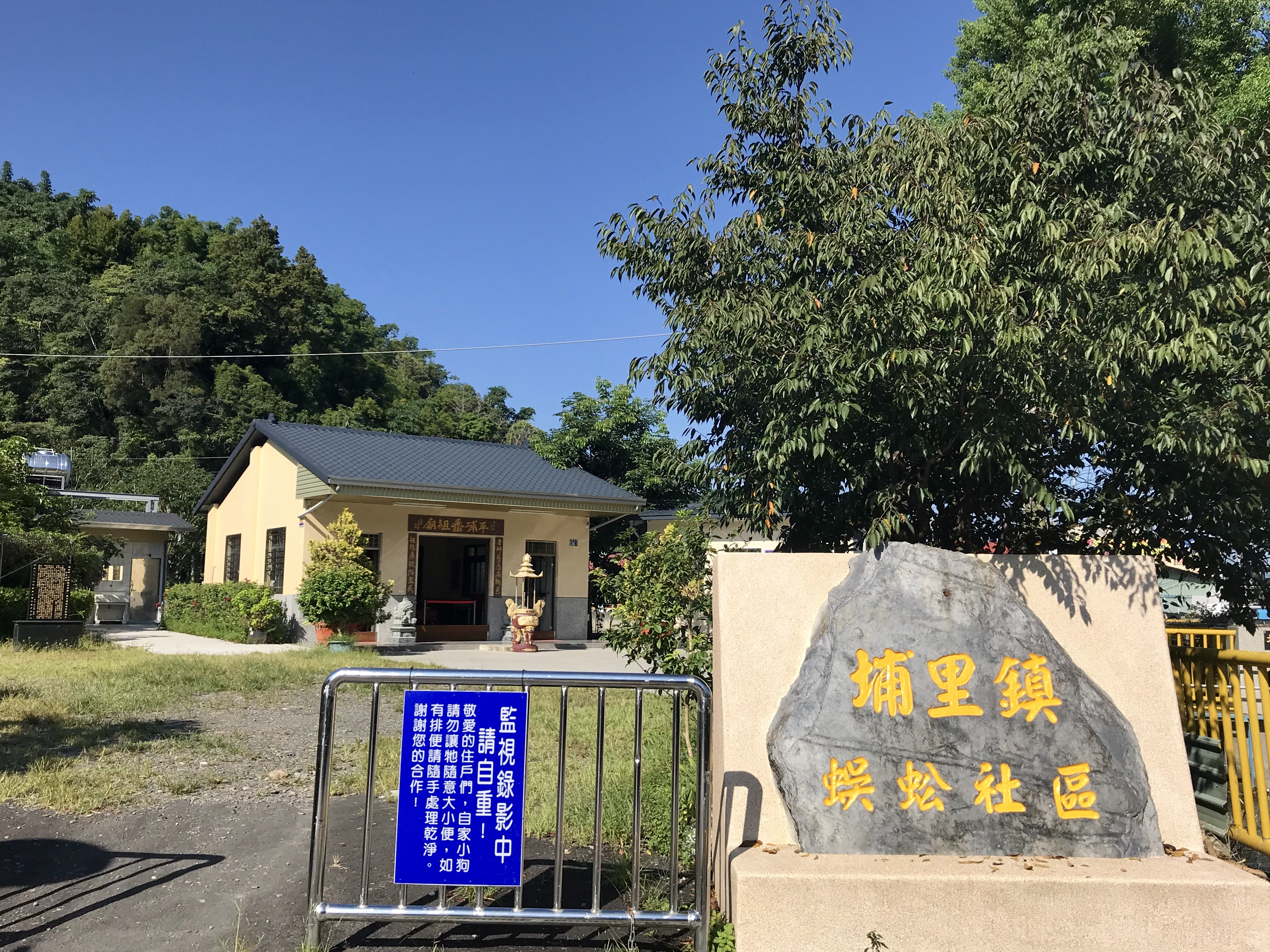 中文（台灣）: 平埔番祖廟遠照